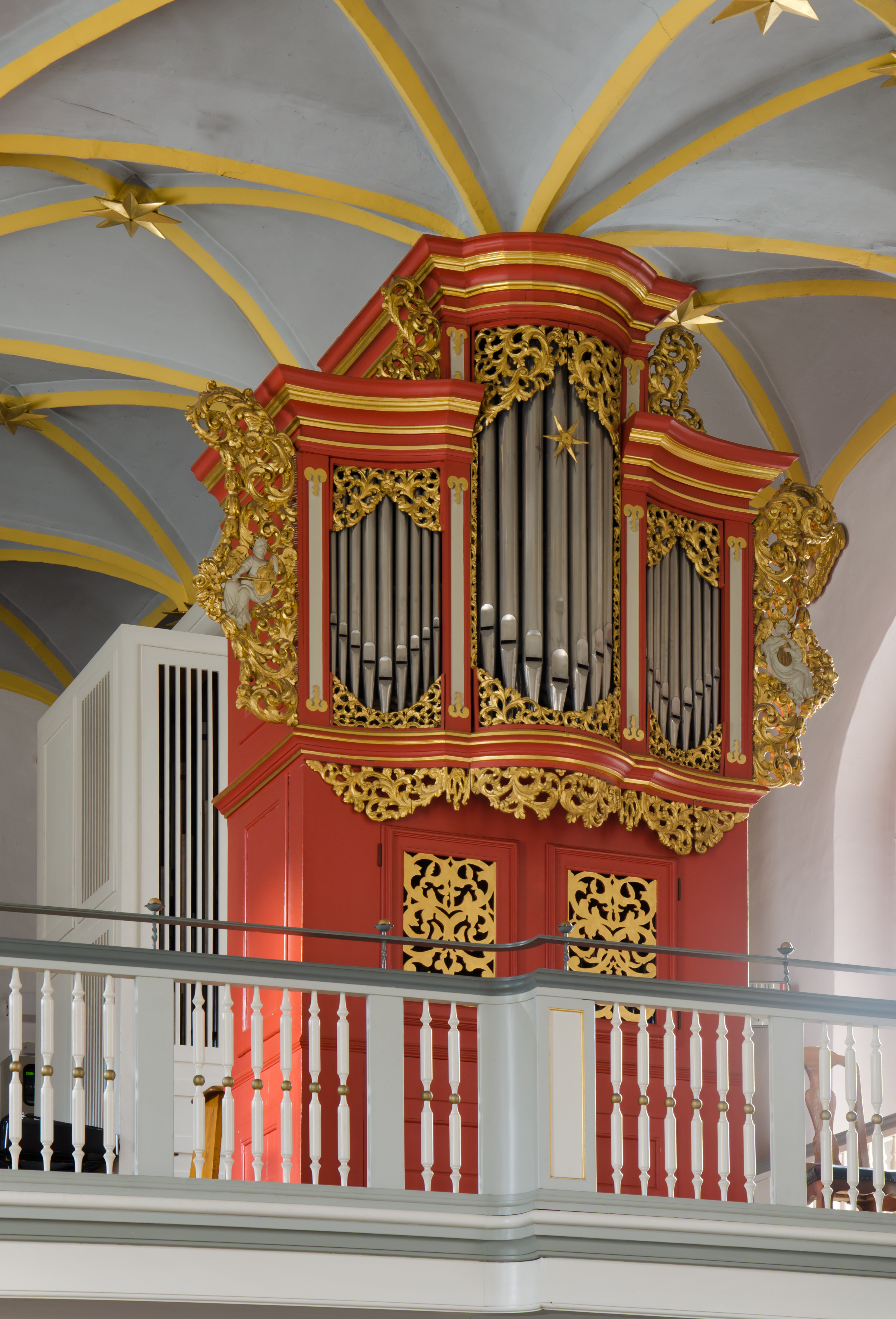 Ahrensburg Schlosskirche Orgel